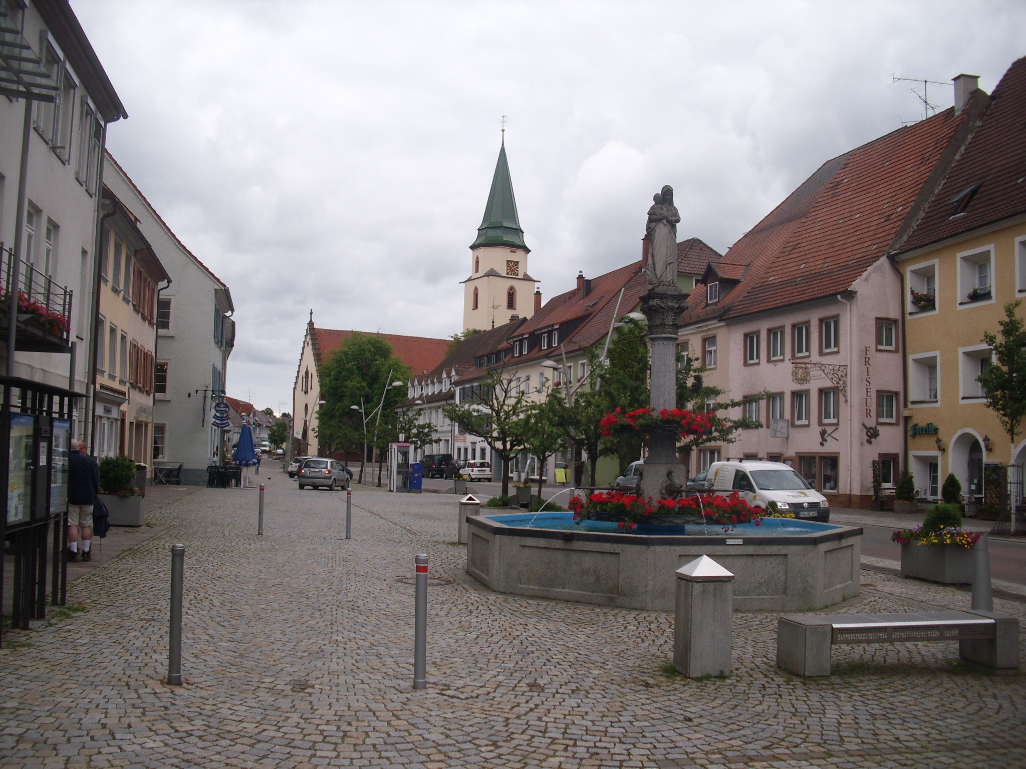 Hüfingen - Schwarzwald-Baar-Kreis - Baden-Württemberg - Deutschland